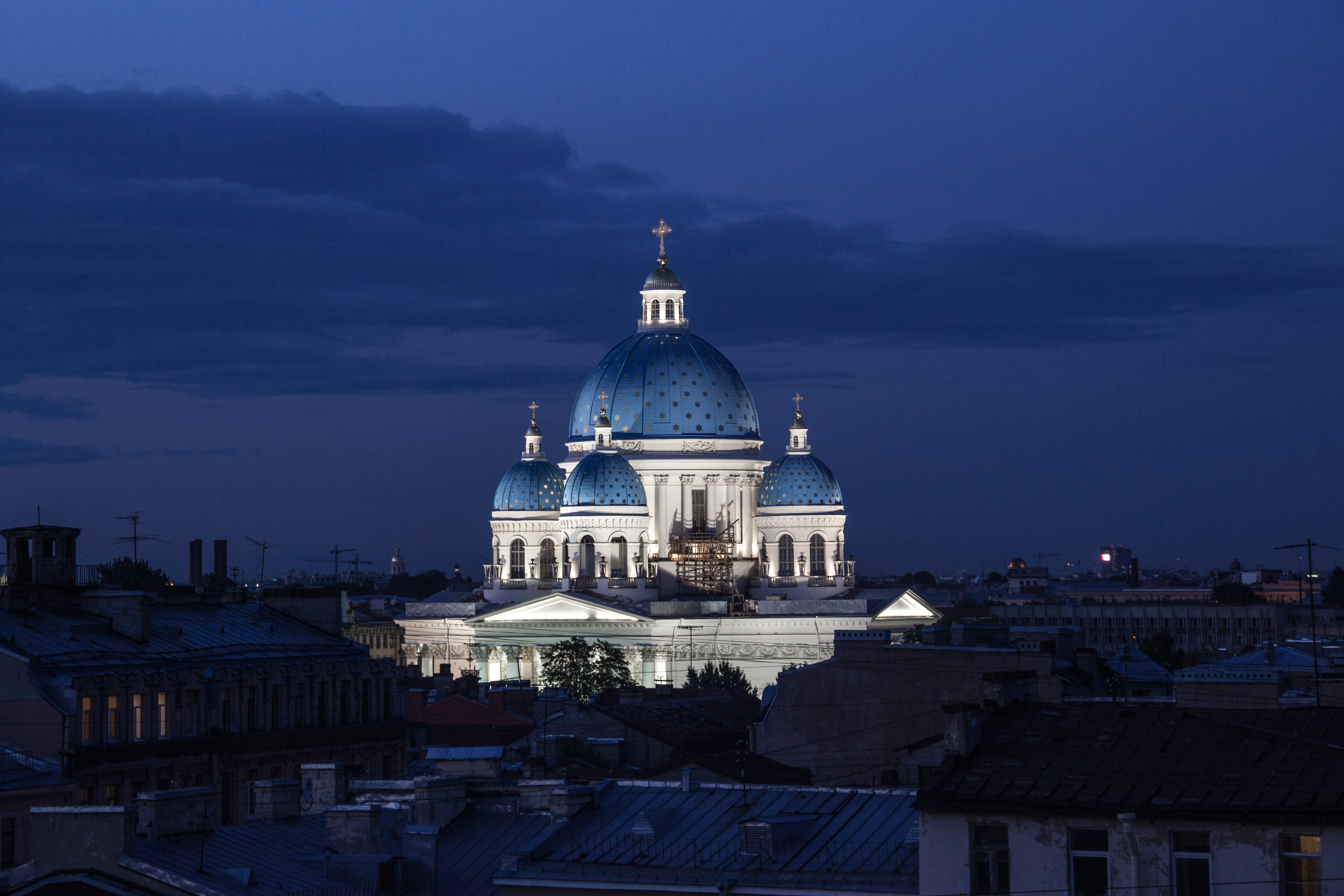 Собор Троицкий (Измайловский): Измайловский проспект, 4-а, 7-а, Адмиралтейский район, Санкт-Петербург